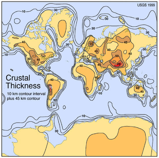 ภาพแสดงความหนาของเปลือกโลกในบริเวณต่างๆของโลก โดย USGS